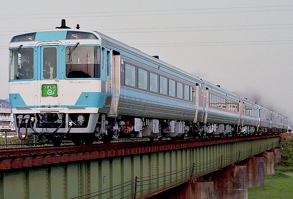 JR四国 キハ185系特急形気動車 特急うずしお14号（お召し列車）